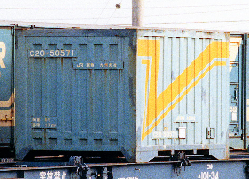 JR貨物 C20-50571 九州支社色